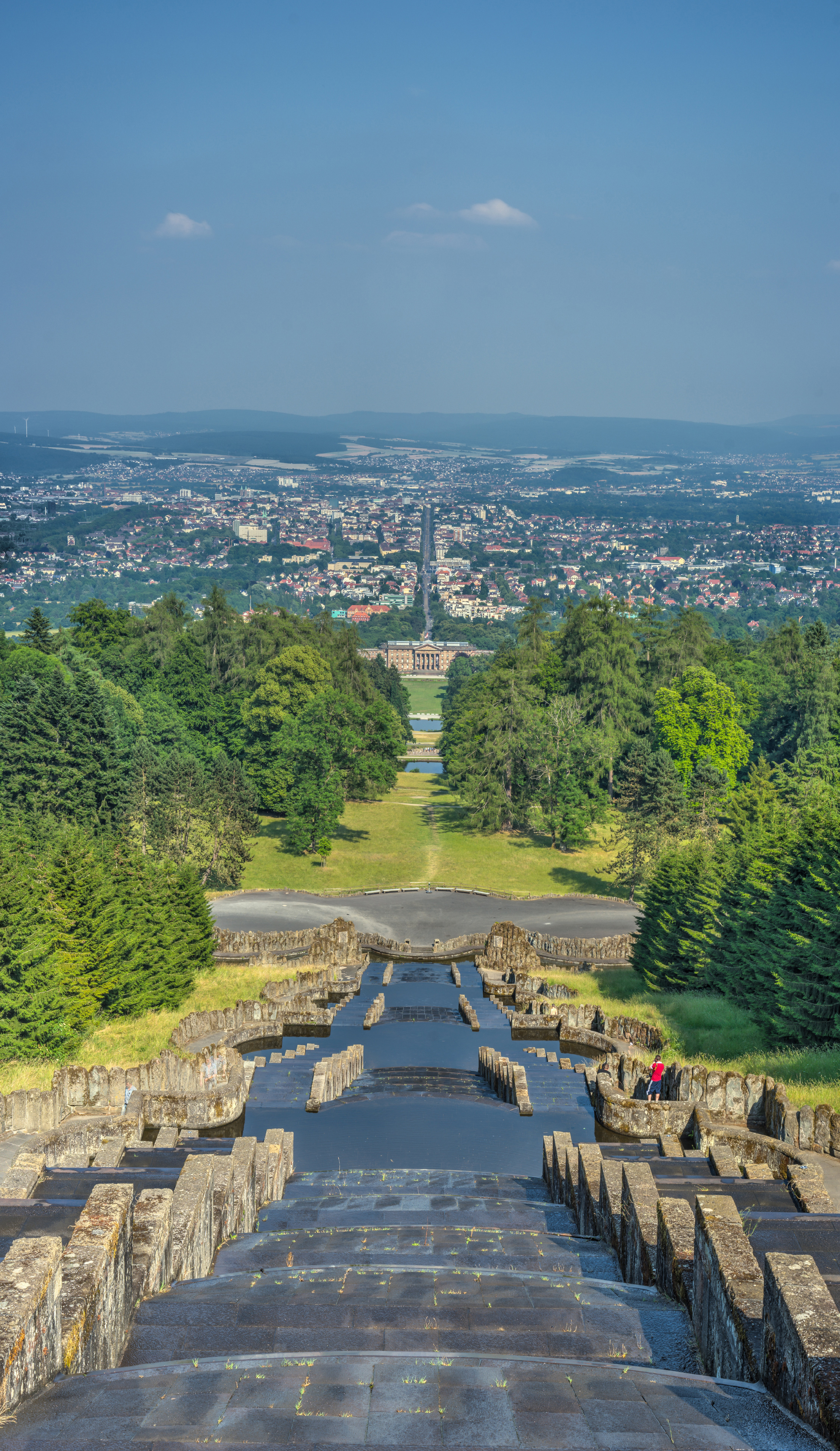 Die zentrale Achse des Bergparks in Kassel-Wilhelmshöhe. Im Hintergrund sind unter anderem das Schloss Wilhelmshöhe sowie die Wilhelmshöher Allee zu erkennen.